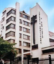 Catedral de San Pablo de la Iglesia Episcopal en Bogota